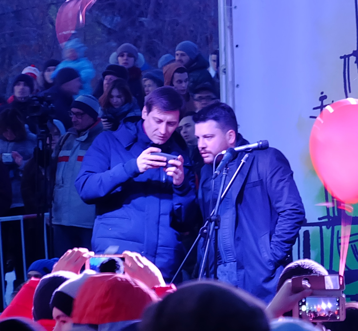 Леонид Волков и Дмитрий Гудков на митинге против отмены выборов мэра Екатеринбурга, Площадь Обороны, 2 апреля 2018 года